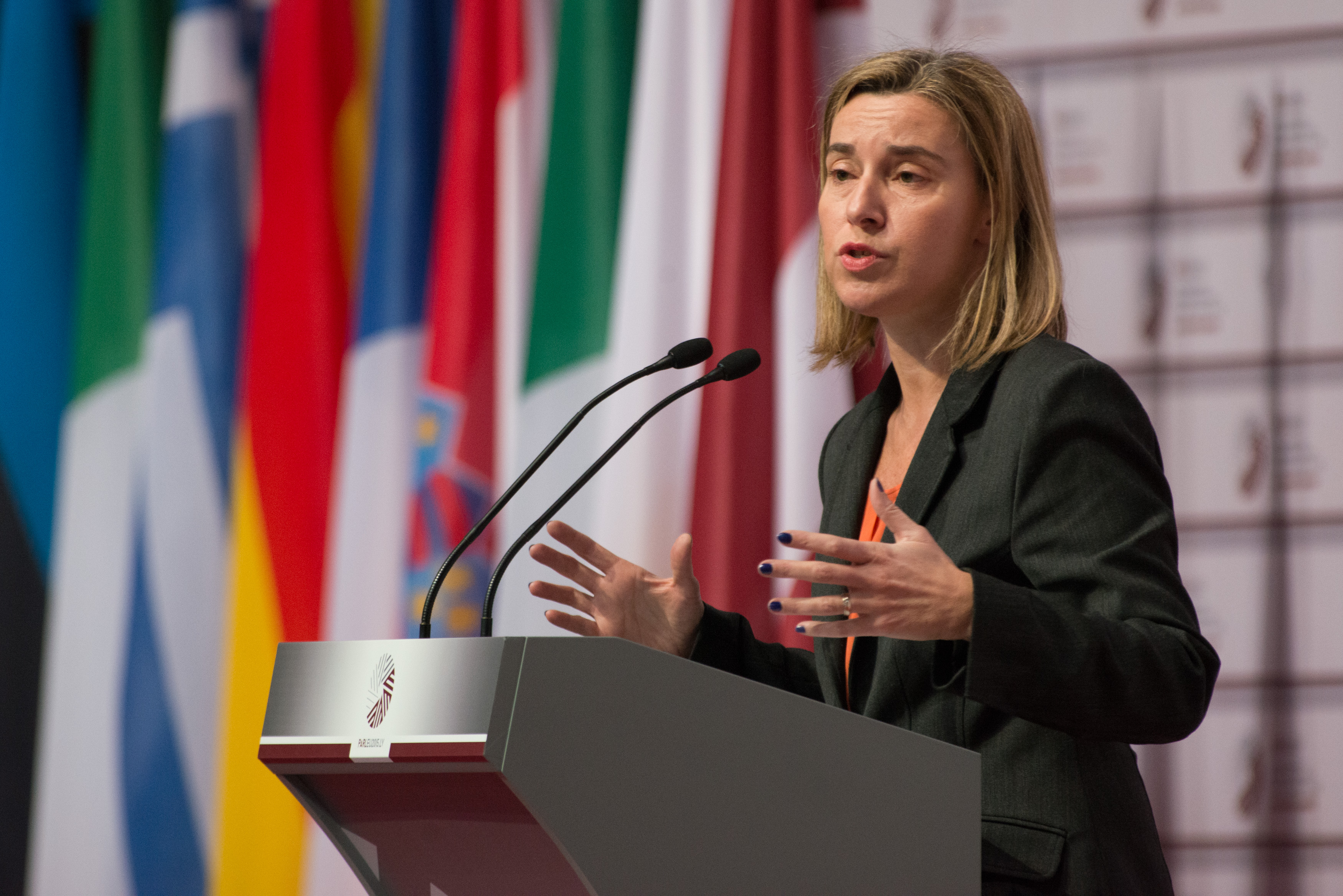 Federica Mogherini, 2015.gada 5.marts. Starpparlamentārā konference par kopējo ārpolitiku un drošības politiku, kā arī kopējo drošības un aizsardzības politiku. Foto: Ernests Dinka, Saeimas Kanceleja Izmantošanas noteikumi: saeima.lv/lv/autortiesibas